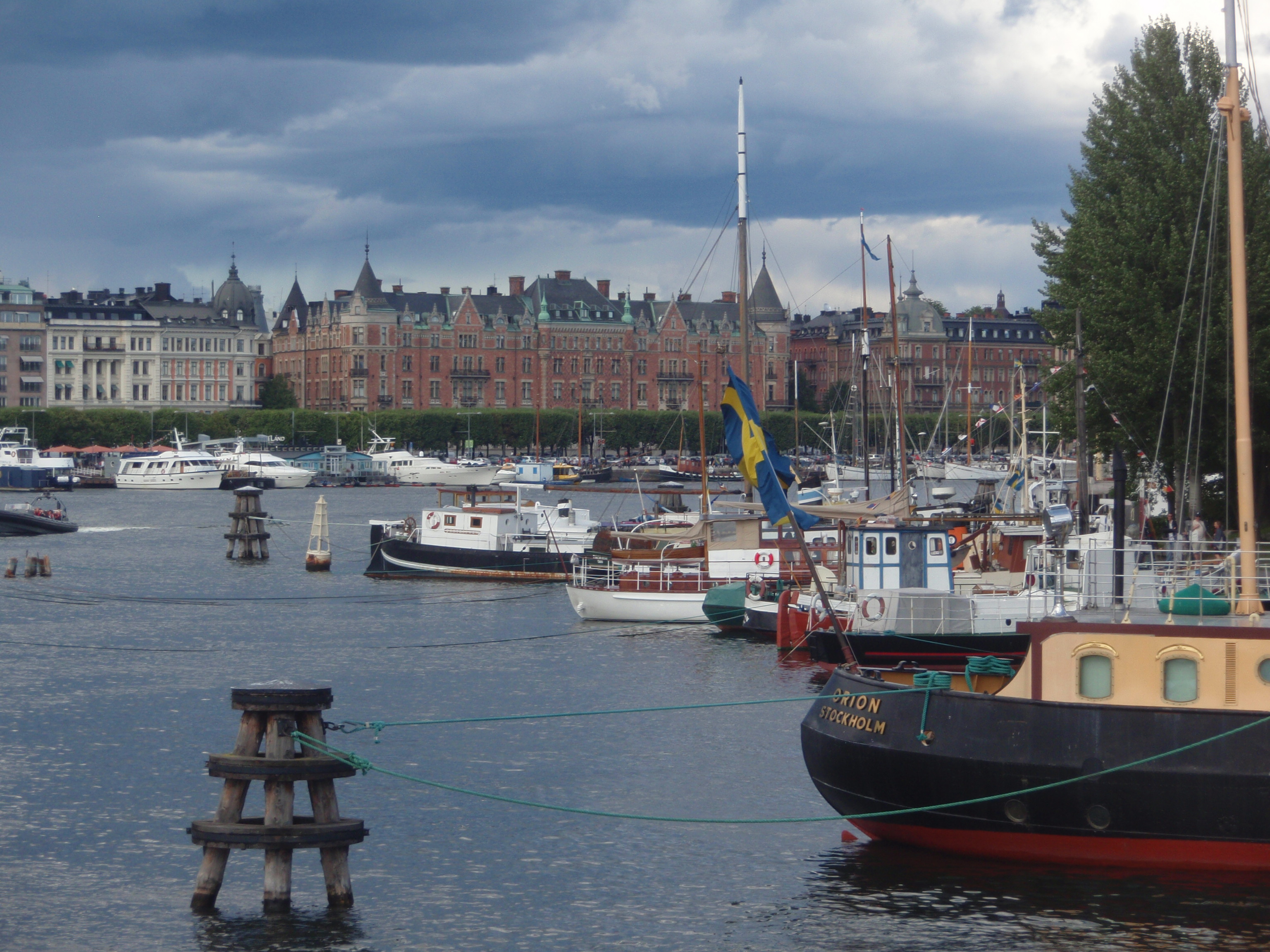 Vue de Strandvägen, Stockholm (Suède).